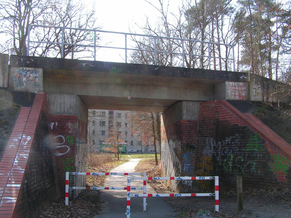 Unterführung der Kreisbahn Rathenow-Senzke-Nauen unter der Brandenburgischen Städtebahn in Rathenow